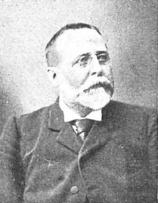 Retrato de Ramón Fernández Hontoria por Manuel Compañy y recogido en la revista española Nuevo Mundo.